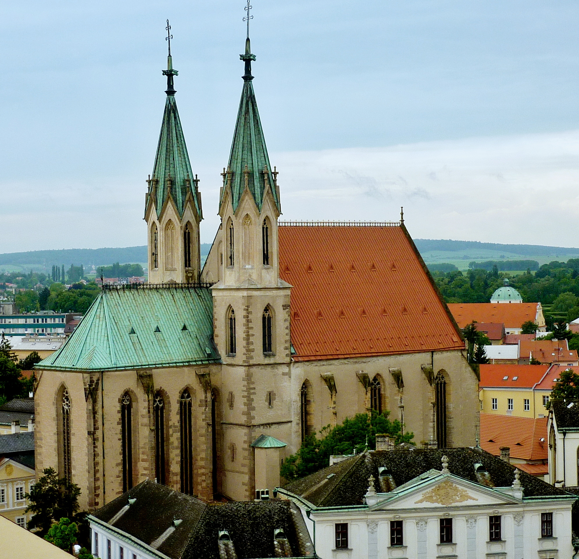 Kostel sv. Mořice (Kroměříž), Stojanovo 1139, Kroměříž, Kroměříž.